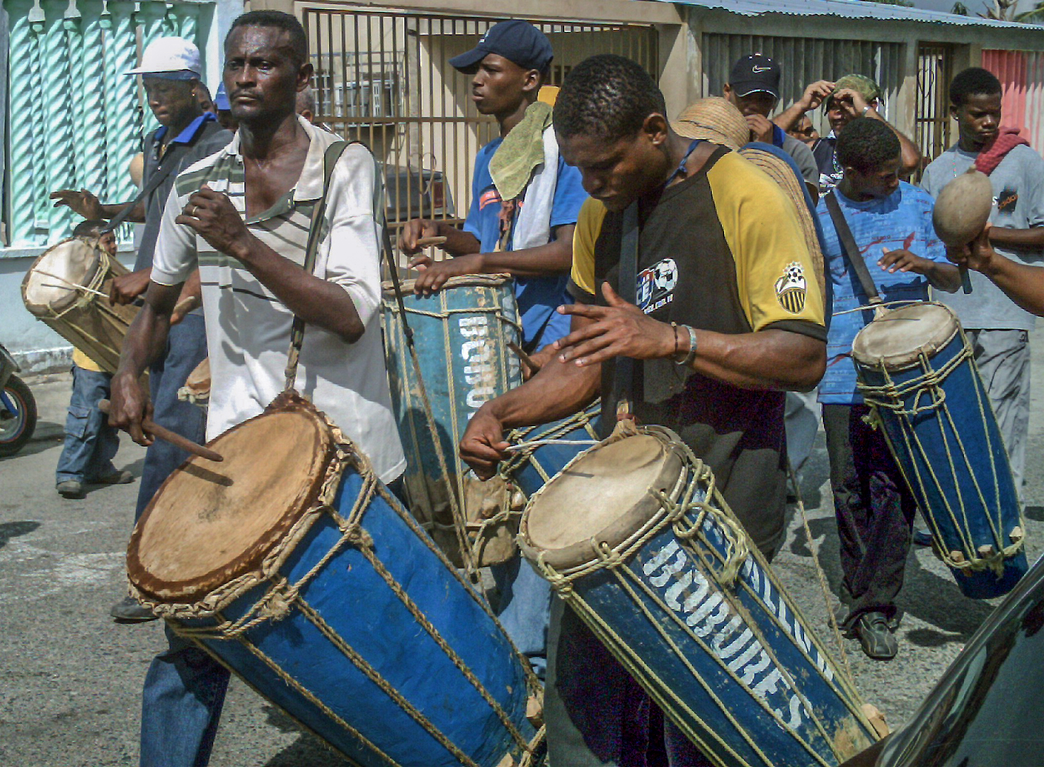 San Benito de Palermo y los Chimbángles. El culto a San Benito de Palermo, se realiza en muchas regiones de Venezuela. Tiene su momento culminante los días 27 y 28 de diciembre y finaliza el 6 de enero. En este caso observamos la festividad realizada por los habitantes de la zona en estas fechas, los intrumentos de percusión chimbangueles mostrados en la fotografía, son membranófonos cónicos de un solo parche que se tensa a través de un acordado de manera de W. Los instrumentos se tocan con un palo y la otra mano libre Archivo:Tambor Venezolano en el Zulia.ogg Escuchar a tambores de San BenitoPlay in browserFile description pageHelp me